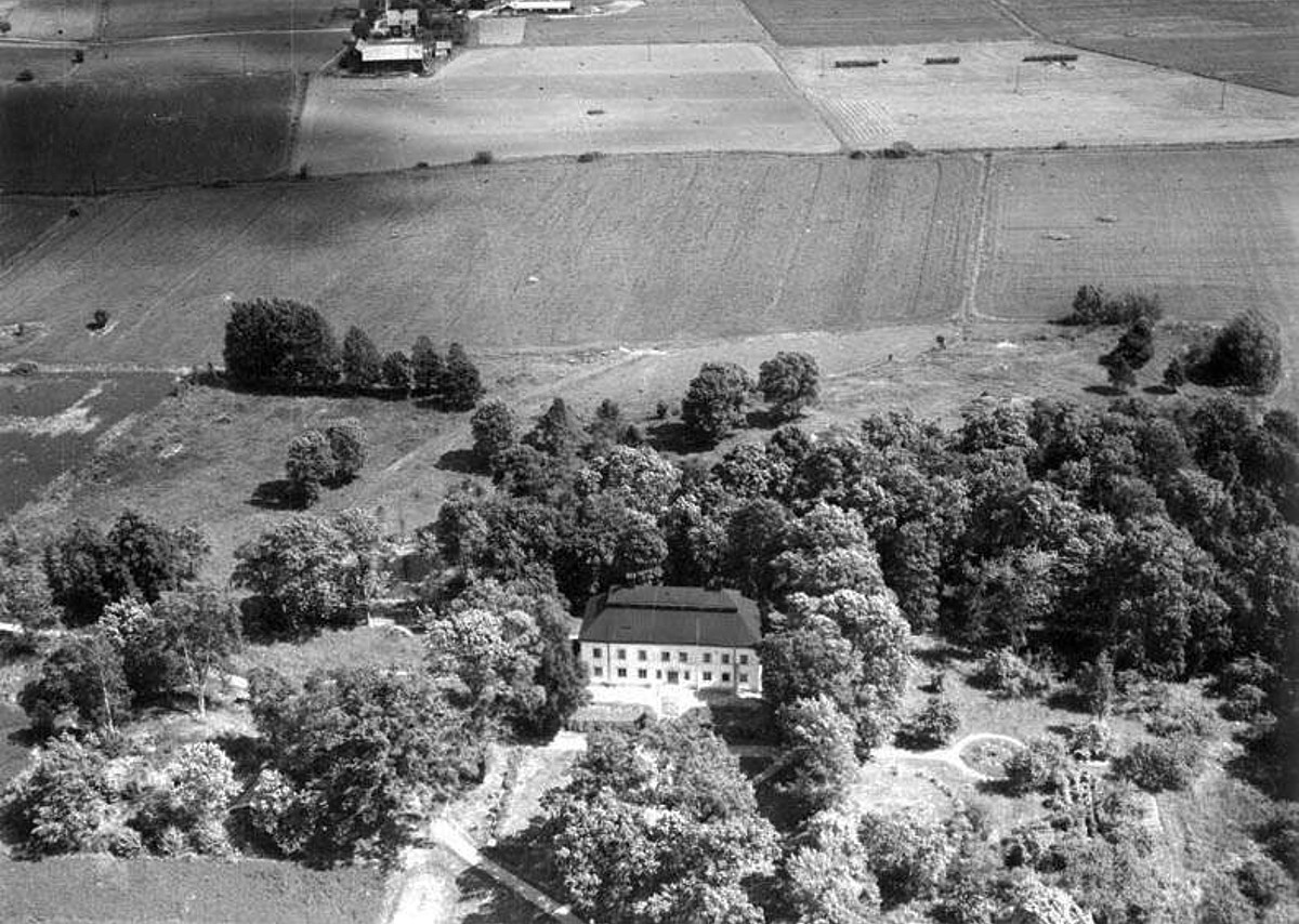 Flygfoto över Viby säteri, Harbo socken, Uppland 1936